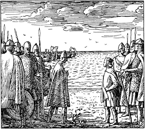 Halfdan Egedius: Illustration for Magnus den godes saga. Snorre 1899-edition. «Magnus den gode og Hårdeknut mødes.» nb: «Magnus den gode og Horda-Knut møtes.» nn: «Magnus den gode og Horda-Knut møtest.»